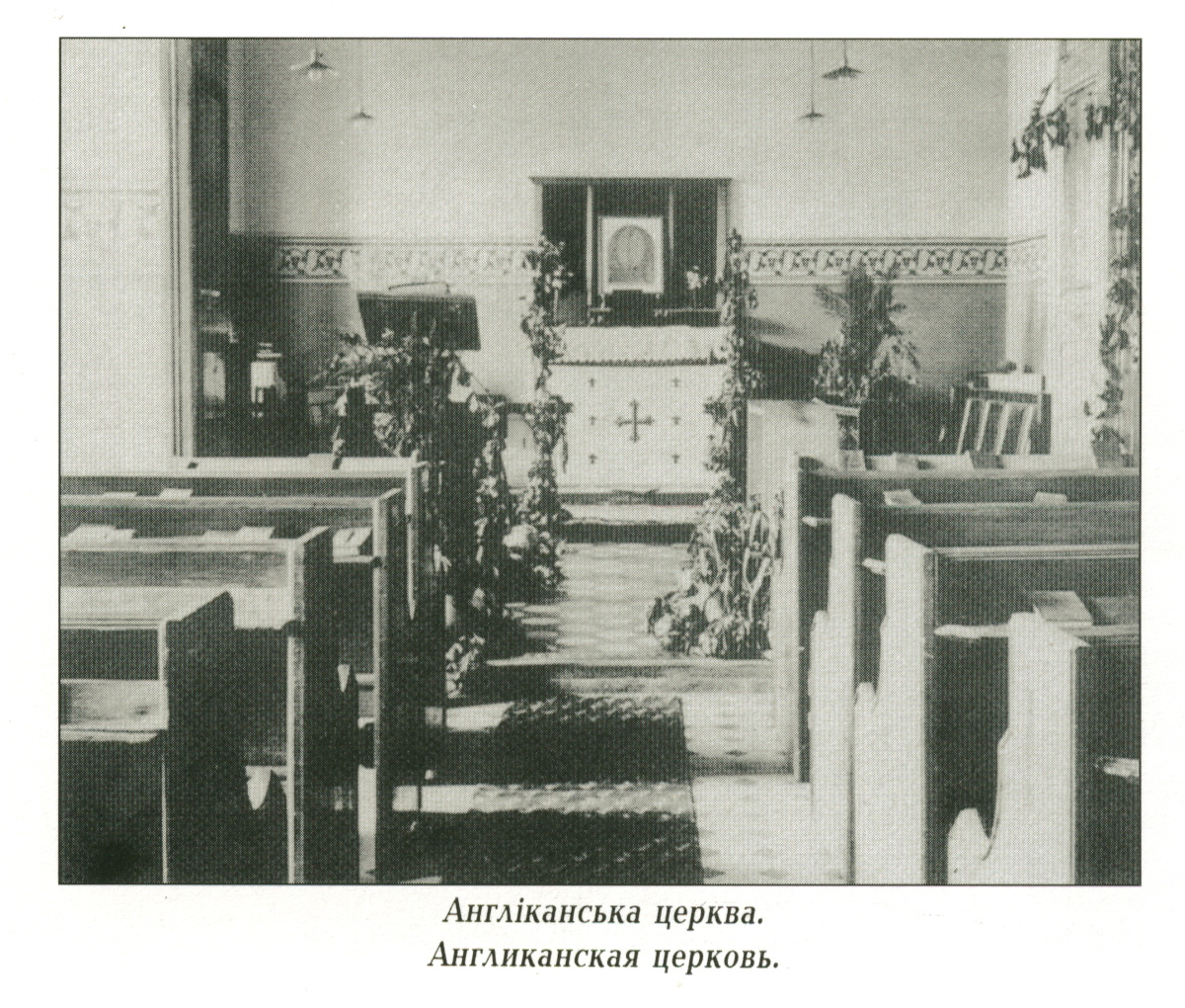 Англиканская церковь в Юзовке